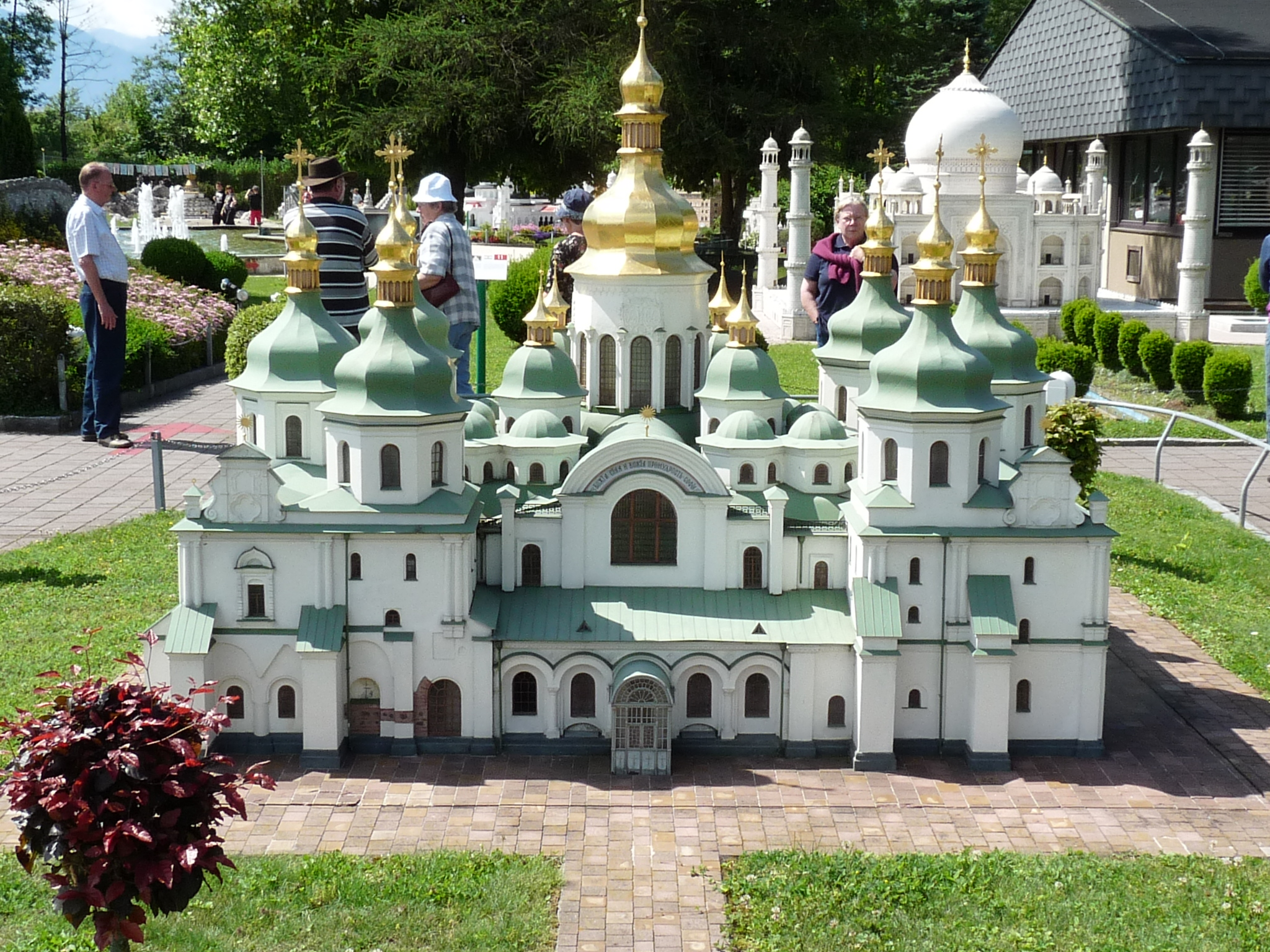 Minimundus Klagenfurt, Sophienkathedrale Kiew